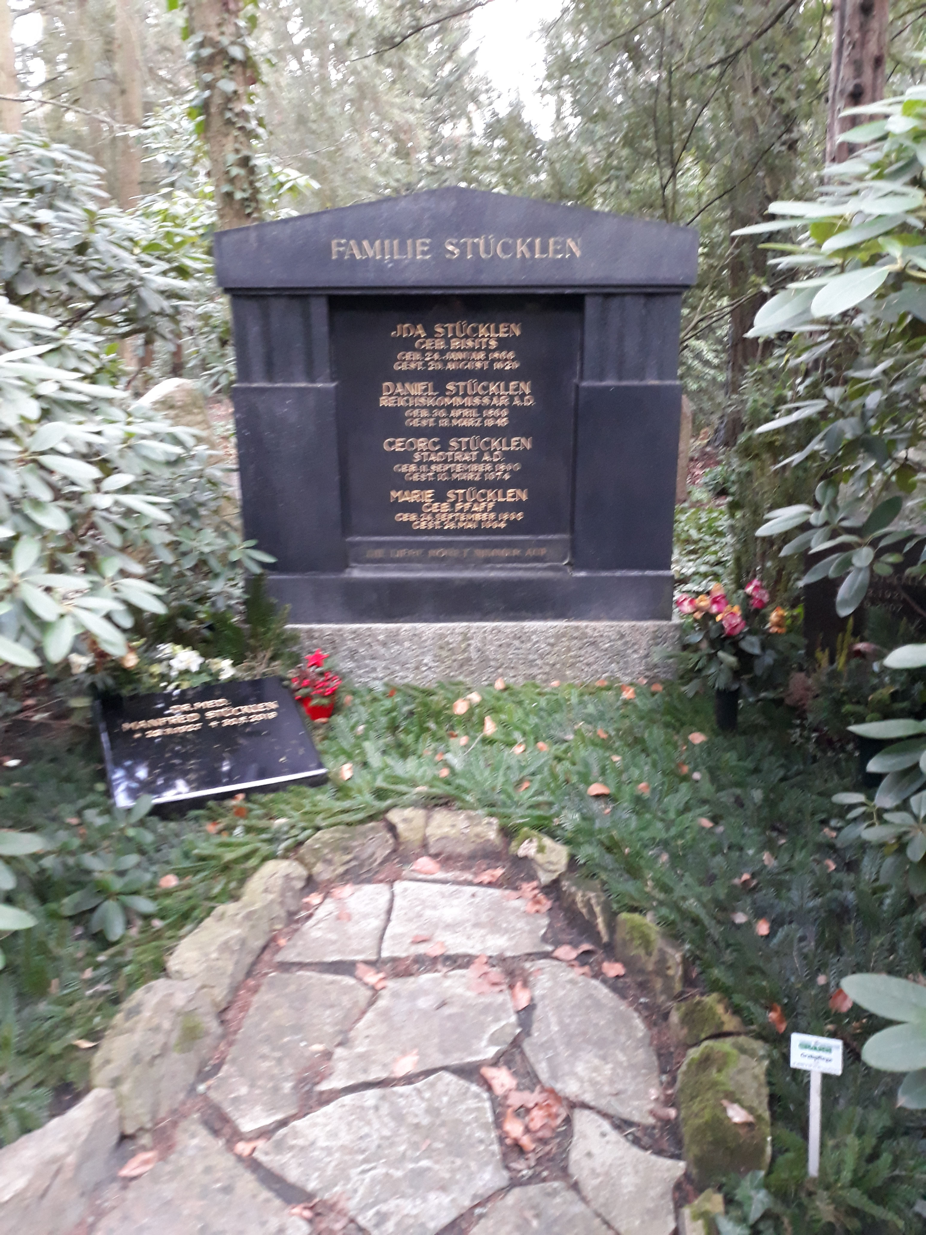 Das Familiengrab der Politikerfamilie Stücklen auf dem Parkfriedhof Lichterfelde in Berlin.